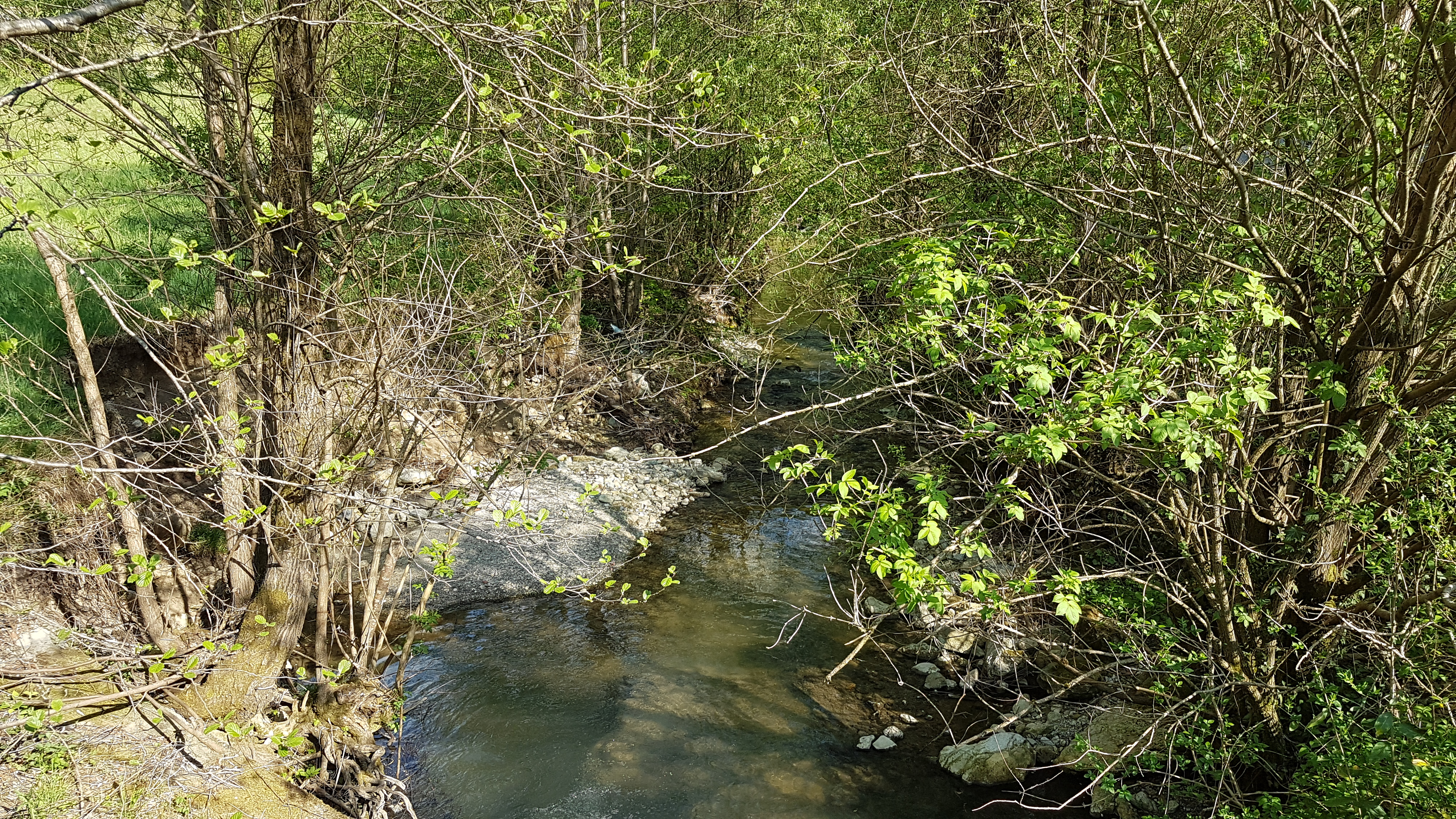 Spodnji tok Kandrščice pri Razpotju ob cesti Izlake-Kandrše, pred izlivom v Medijo